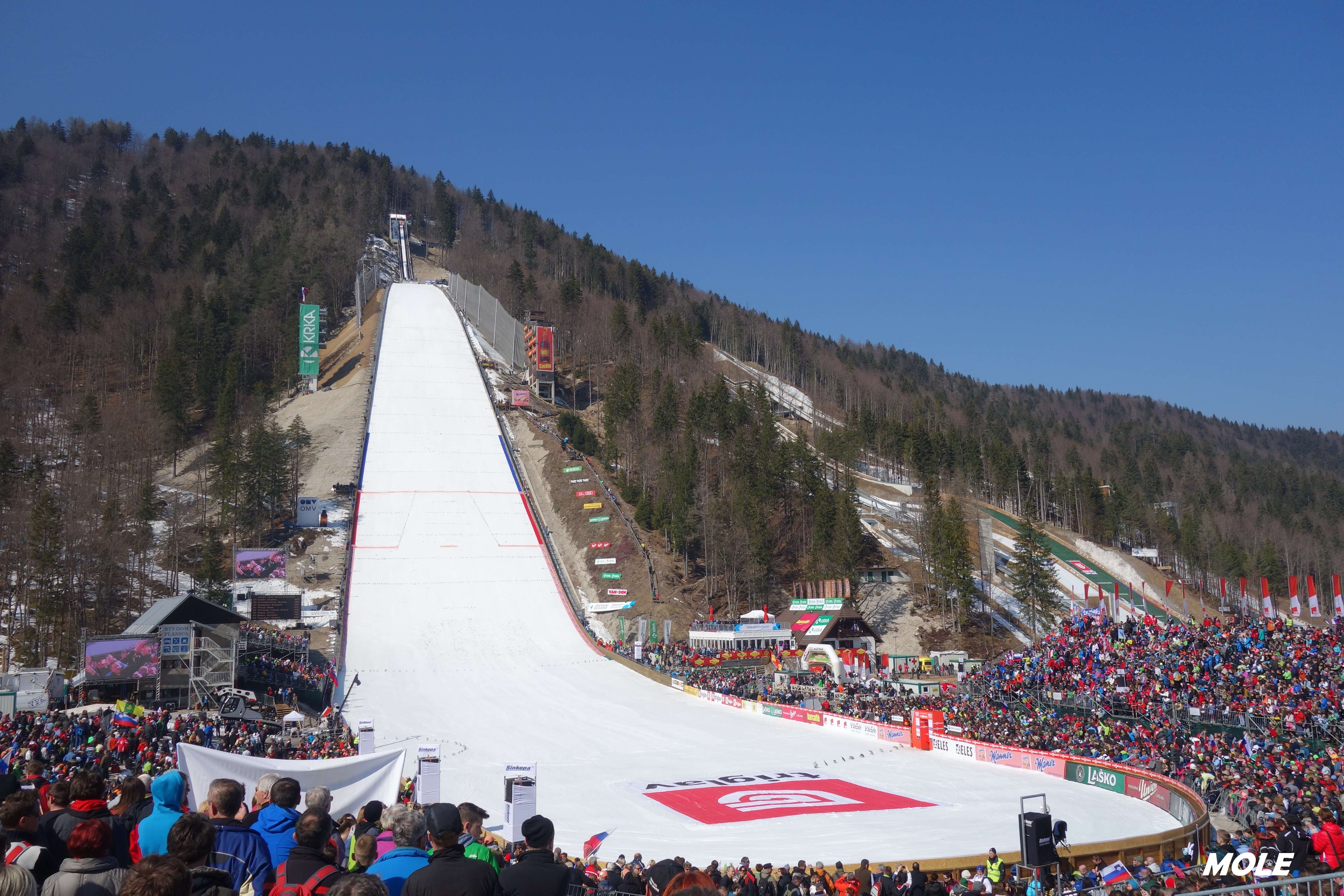 Finale svetovnega pokala sezone 2014/15 je potekalo na prenovljeni letalnici bratov Gorišek. Letalnica je zdaj HS 225 z višinsko razliko 135m, kolikor zaenkrat dovoljuje FIS